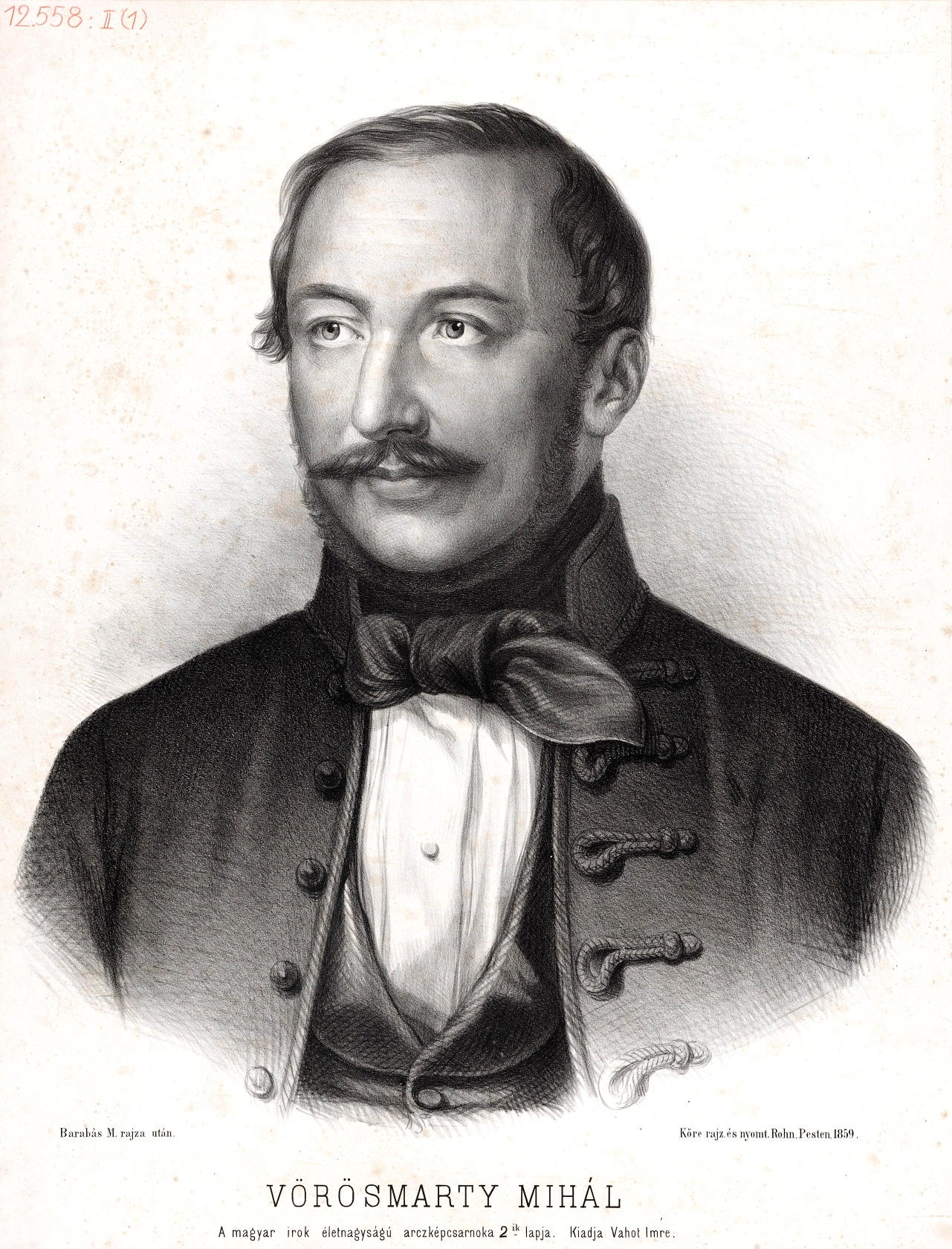 Vörösmarty Mihály (Kápolnásnyék, 1800. december 1. – Pest, 1855. november 19.) magyar költő, író, ügyvéd, a Magyar Tudományos Akadémia és a Kisfaludy Társaság rendes tagja, a magyar romantika egyik legnagyobb alakja.